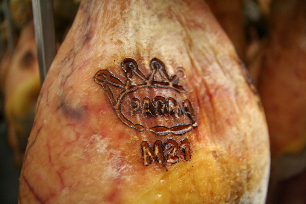 Prosciutto di Parma - marchio a fuoco パルマといえば生ハム！